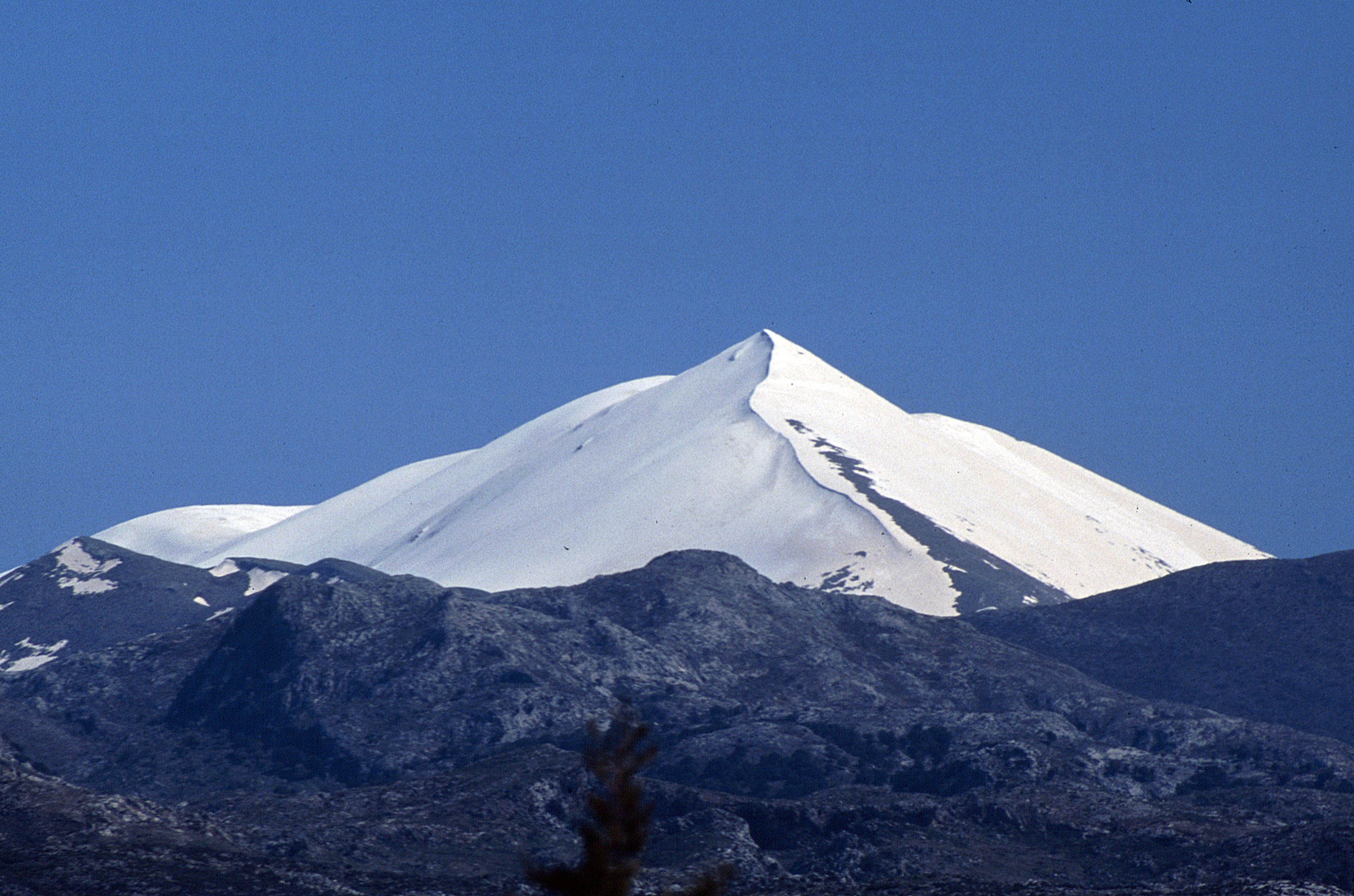 Psiloritis von Eleutherna